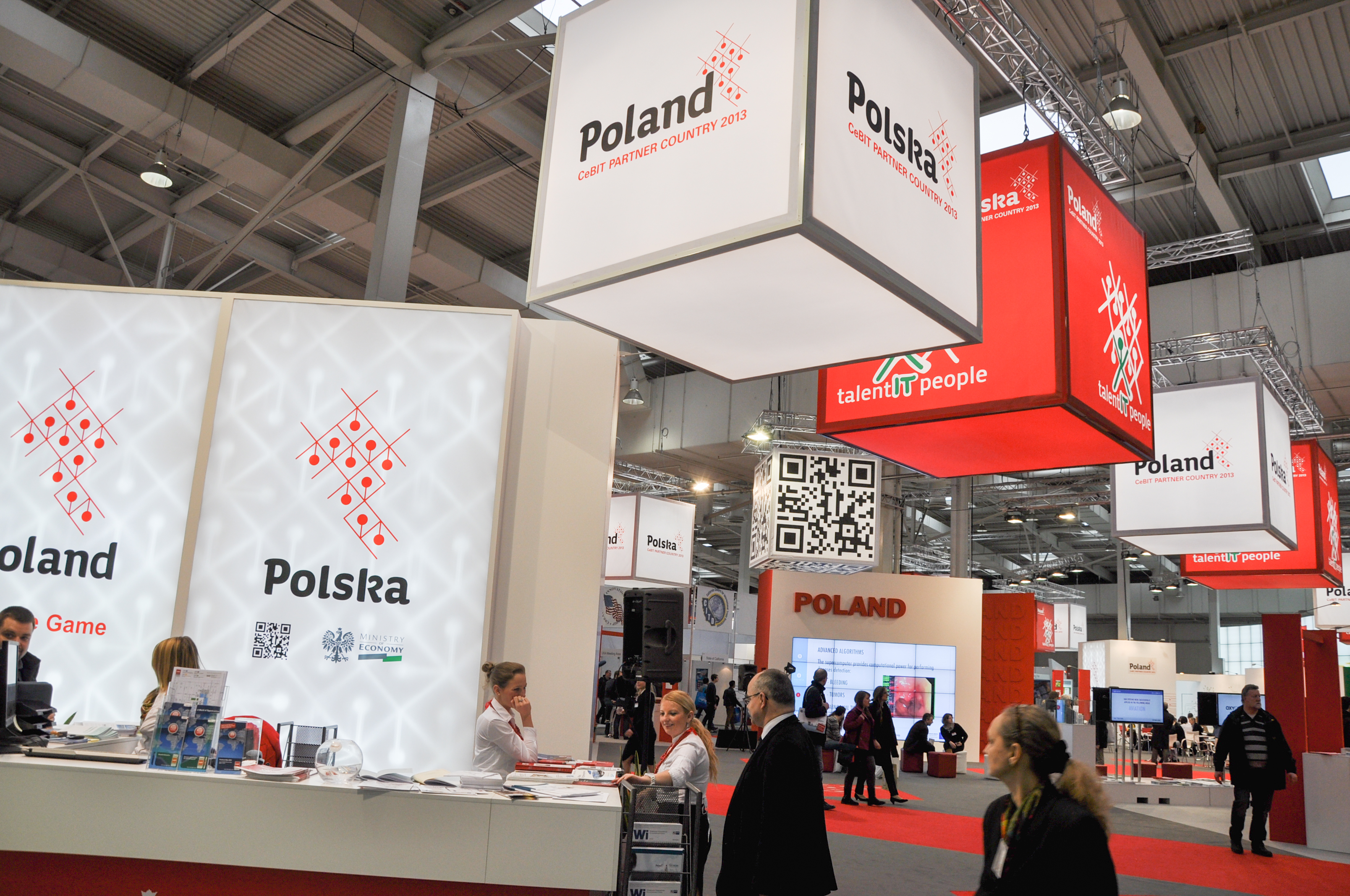 Cebit_1_31